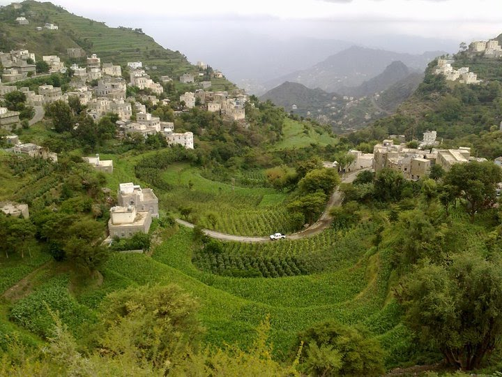 قرية الصوافي مديرية حزم العدين